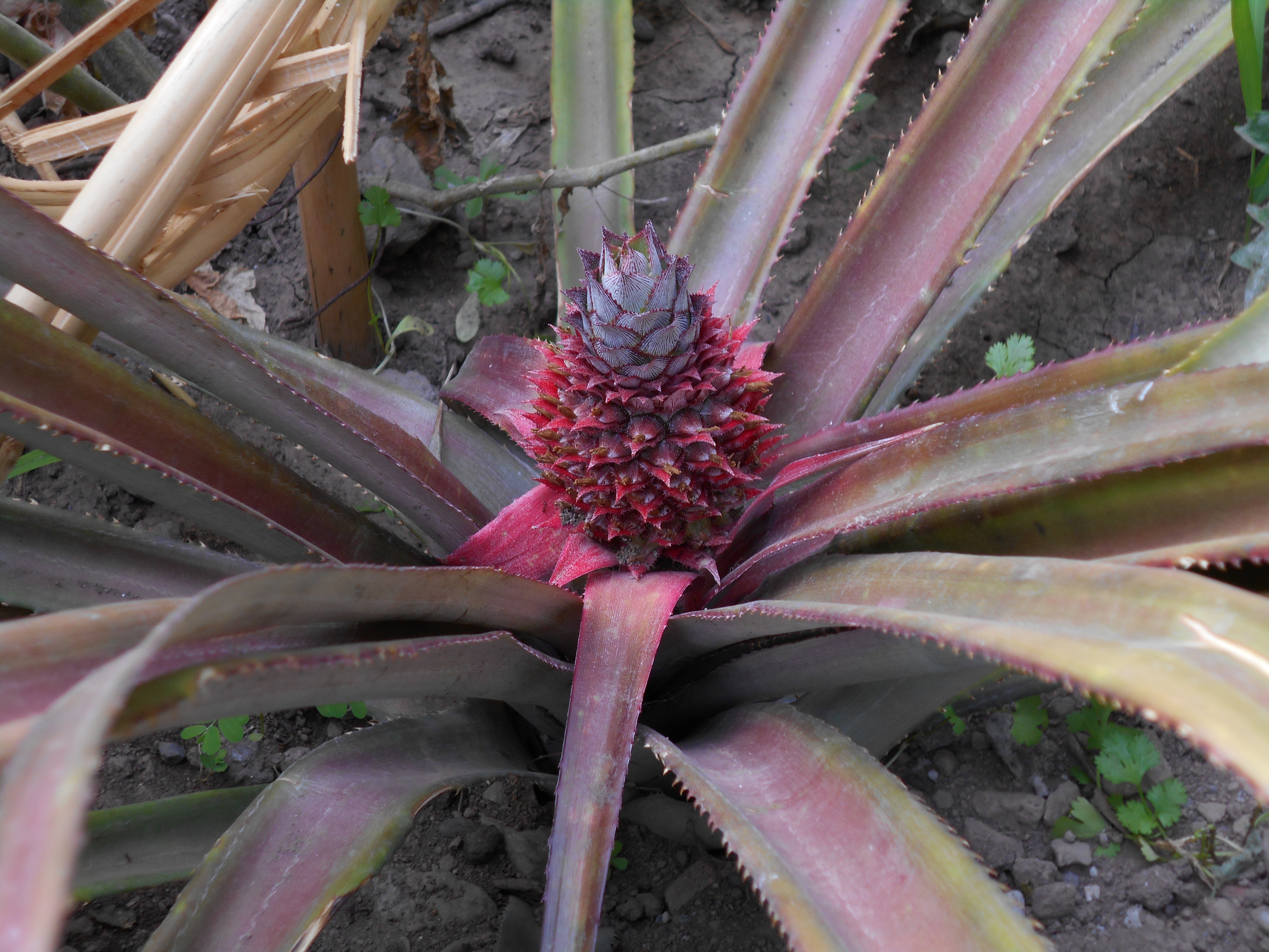 Fiore di ananas cosmosus